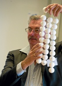 Professor Sten Stymne visar hur oljesyntes i växter går till under en populärvetenskaplig föreläsning